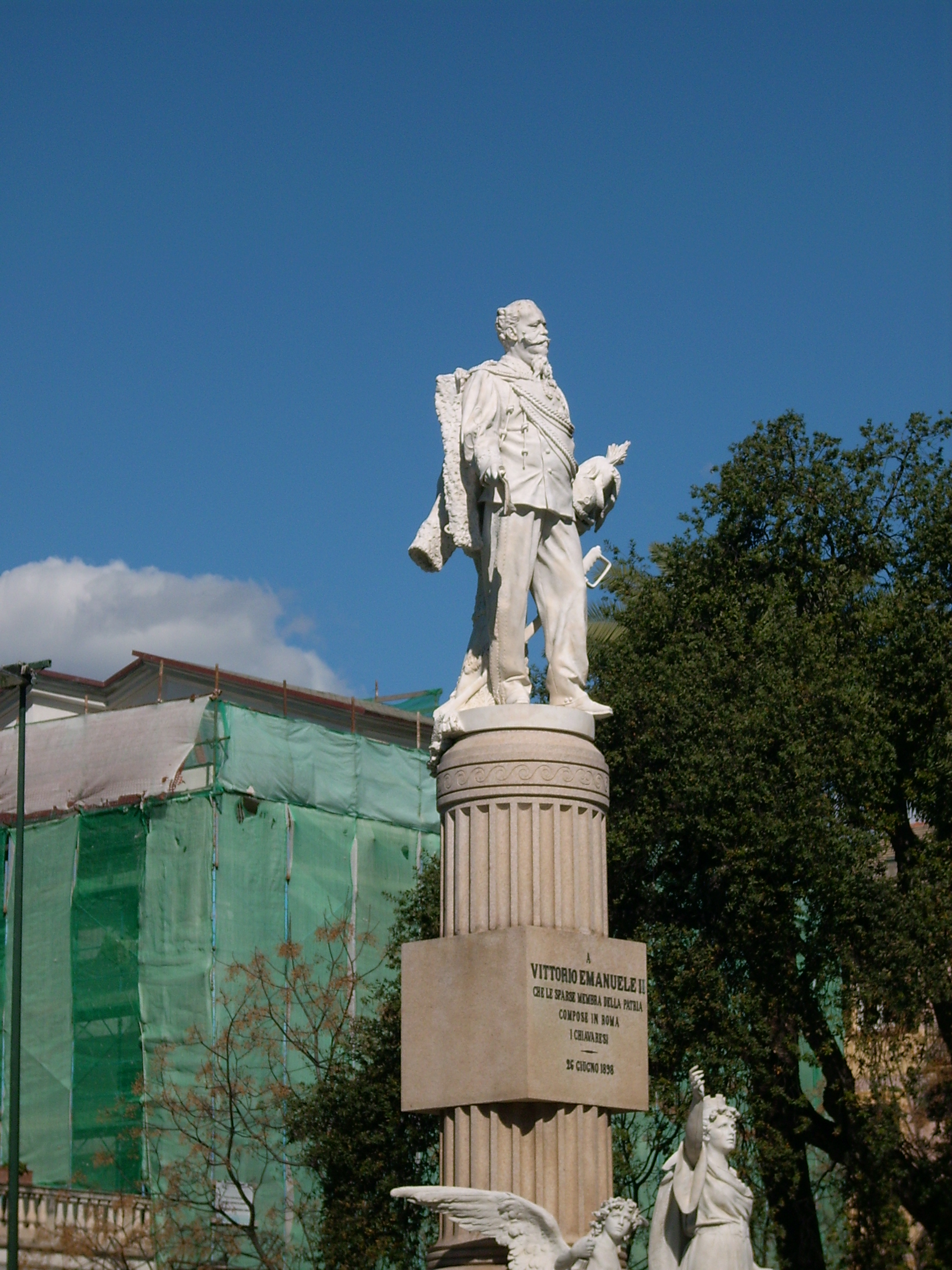 Luigi Brizzolara (1868-1937), Monumento al re Vittorio Emanuele II di Savoia a Chiavari